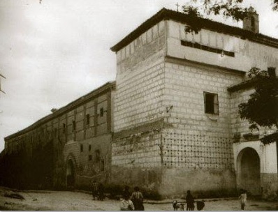 Vista lateral del palacio de Juan II